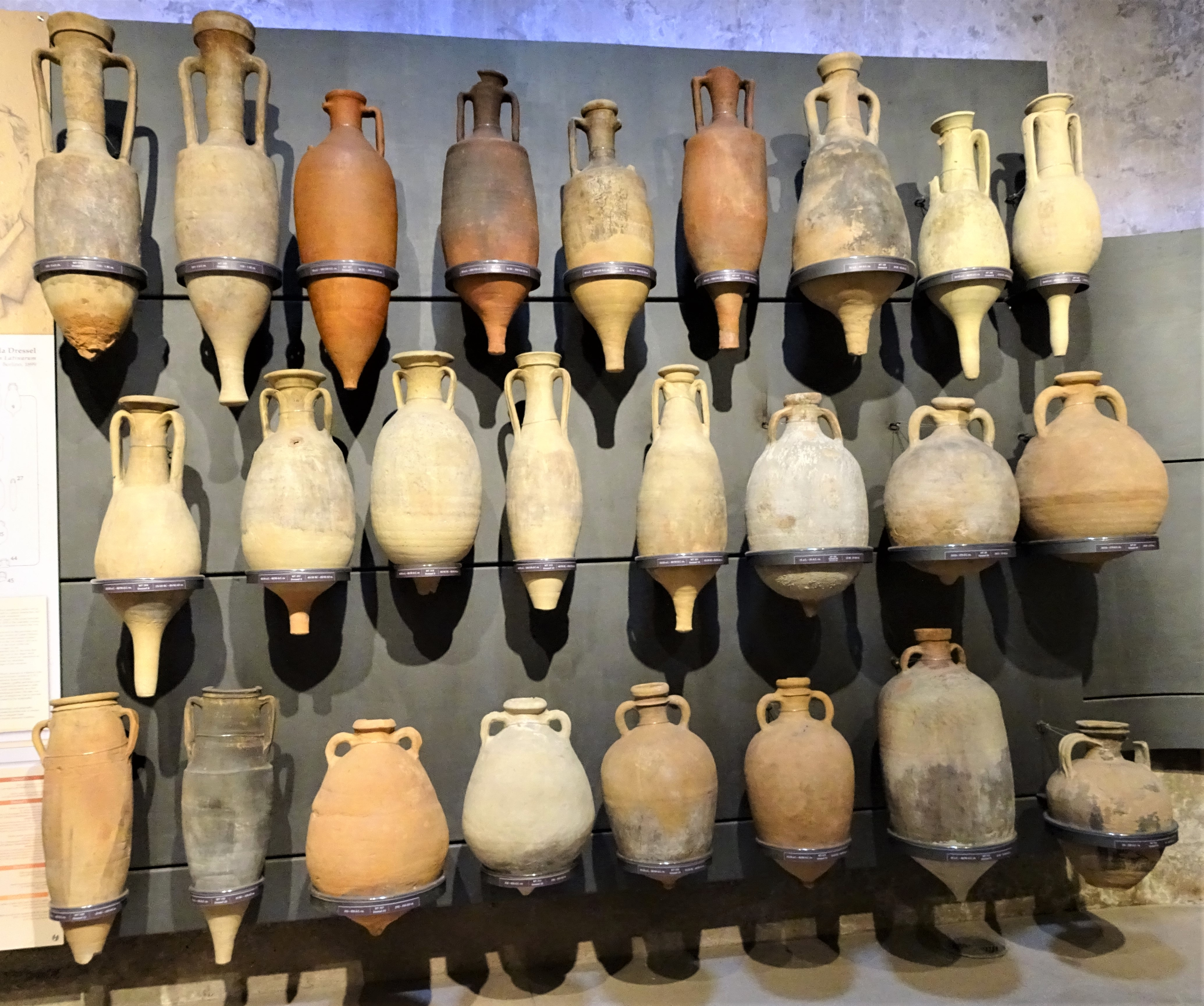 verschillende types amfoor, tentoongesteld in de Mercati di Traiano - Museo dei Fori Imperiali, Rome.